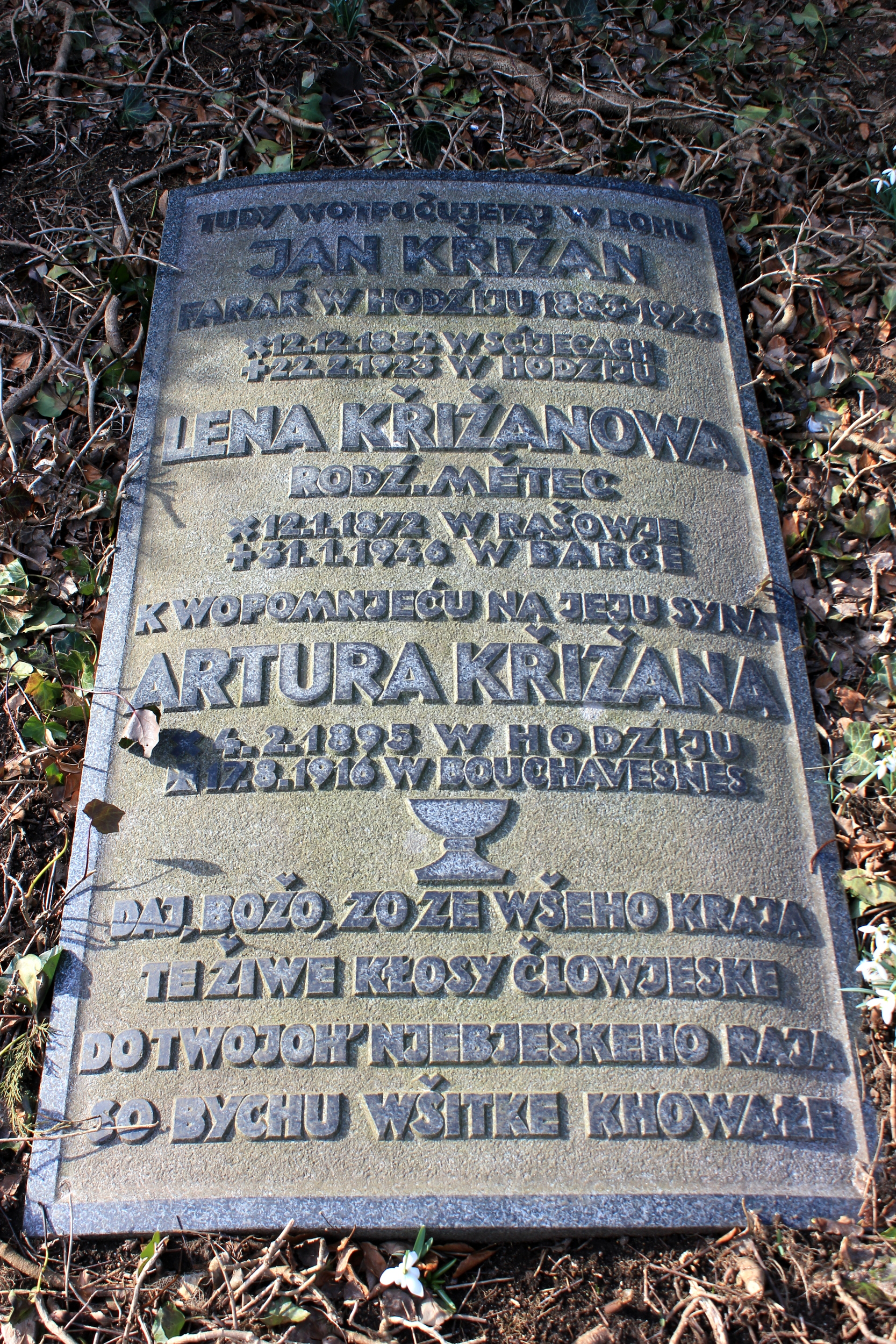 Hornjoserbsce: Narowny kamjeń Jana Pawoła Křižana na Hodźijskim kěrchowje.